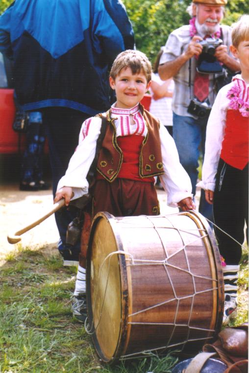 Взето от